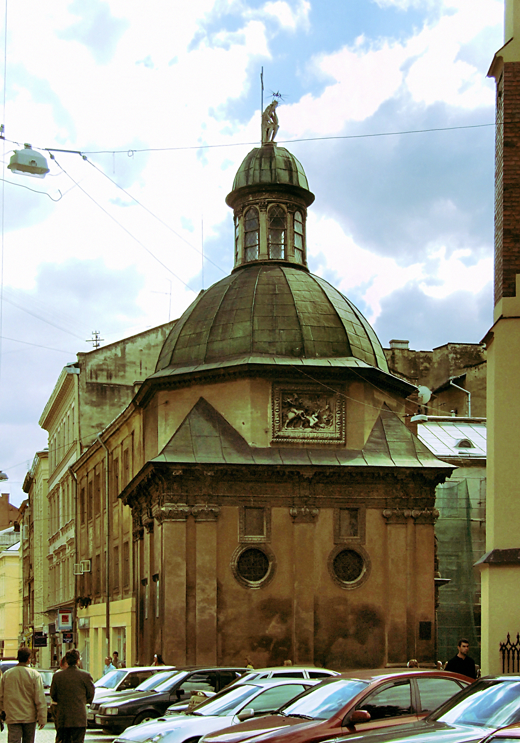 Lwów; kaplica Boimów, (Lviv, Boim's Chapel)